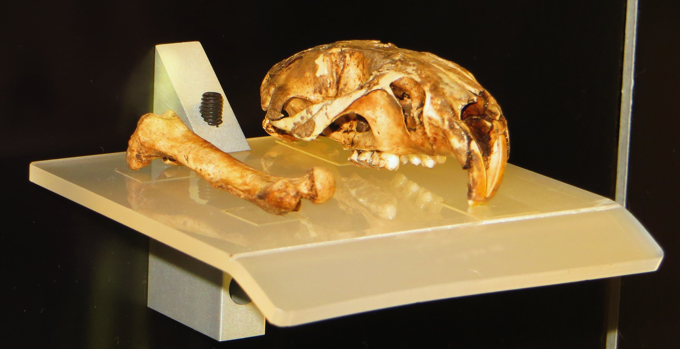 Fossil of Canariomys, an extinct mammal- Took the picture at Museo de la Naturaleza y el Hombre - Tenerife